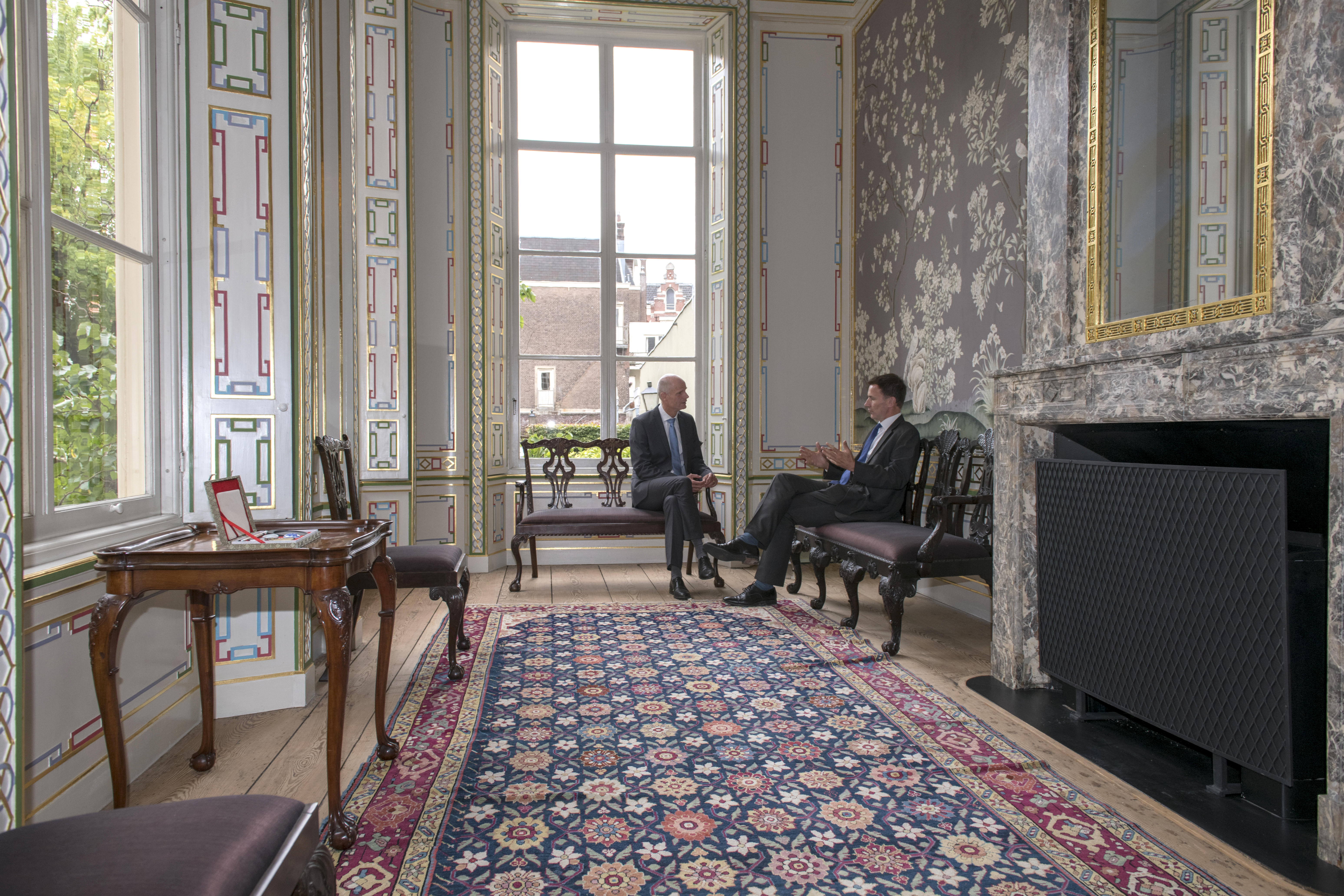 Minister Blok ontving vandaag zijn Britse collega Jeremy Hunt in het Johan de Witt Huis in Den Haag. Blok schreeft na afloop op Twitter: "In gesprek met mijn nieuwe collega @Jeremy_Hunt heb ik het sterke partnerschap tussen het VK en NL onderstreept. Blij met de goede samenwerking in de @NLatUN en steun van het VK voor sancties tegen mensenrechtenschenders. Ik zie uit naar het staatsbezoek in Londen in oktober.